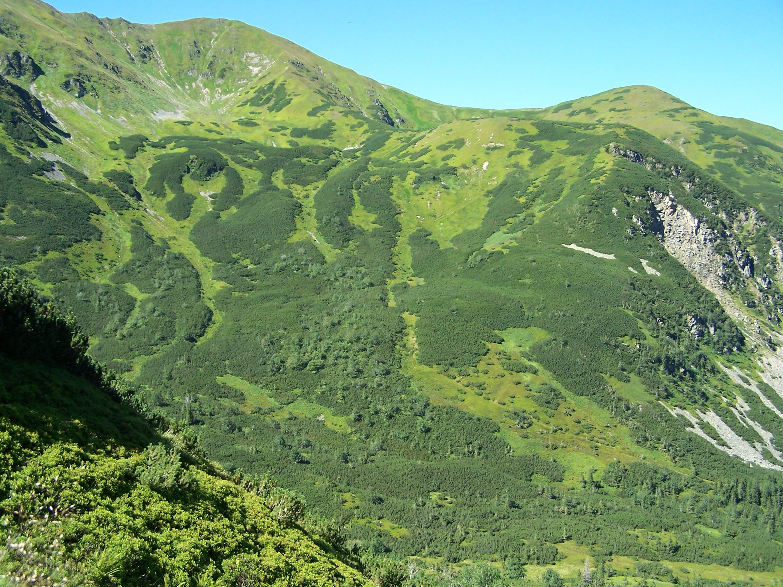 Kończysty Wierch (Tatra Mountains)